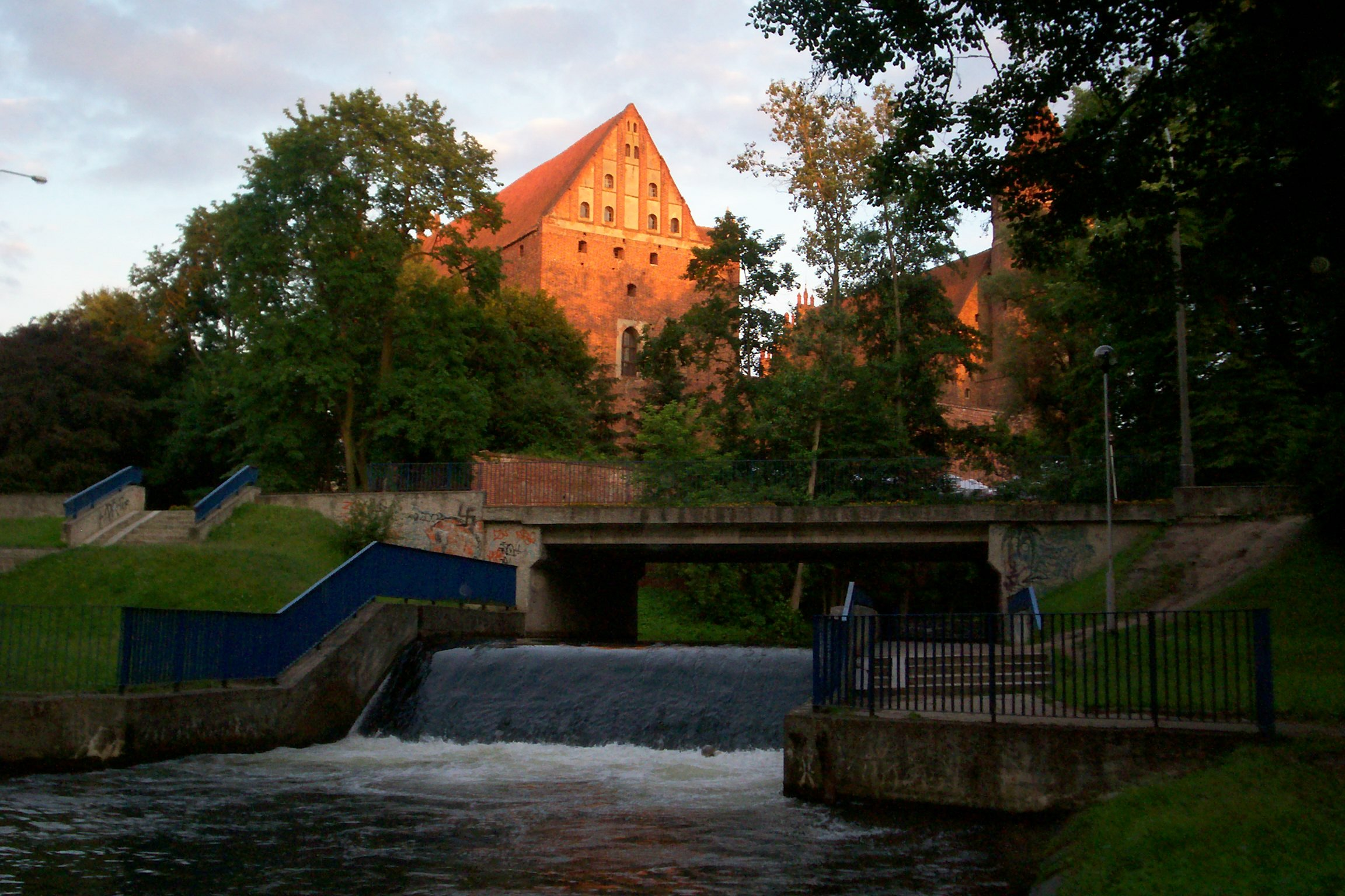 Most Młyński wieczorową porą (w tle Zamek Kapituły Warmińskiej)